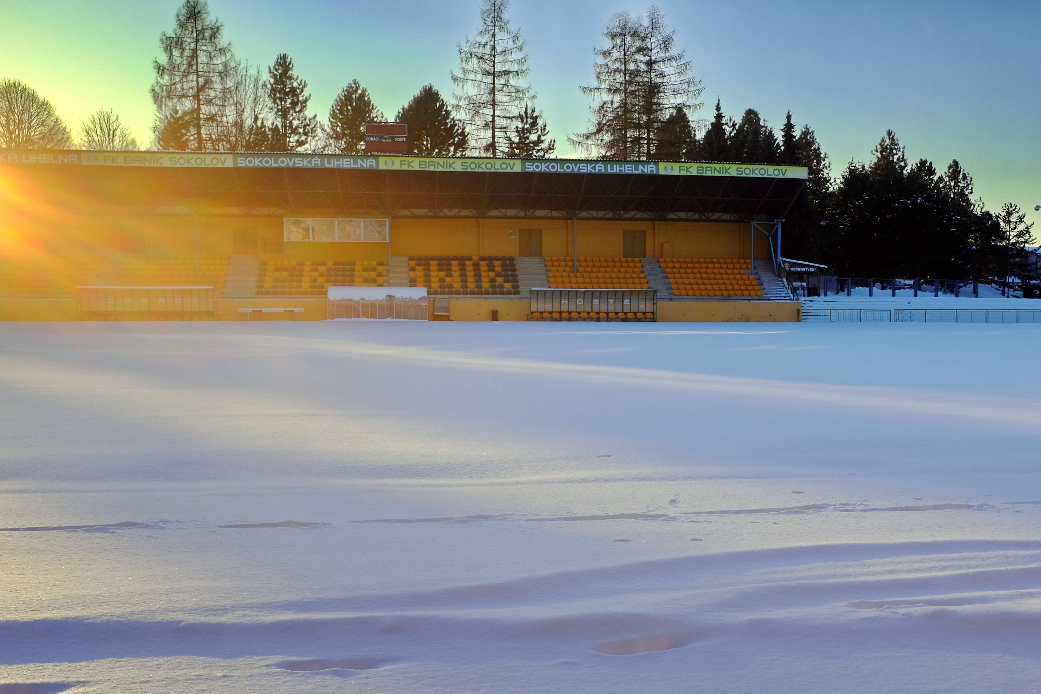 Fotbalový stadion FK Sokolov